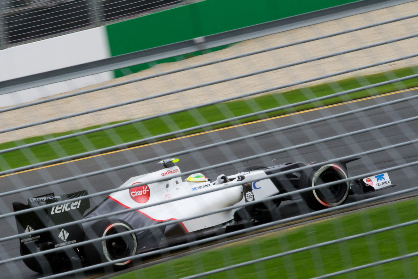 Sergio Perez 2012 Australian Grand Prix